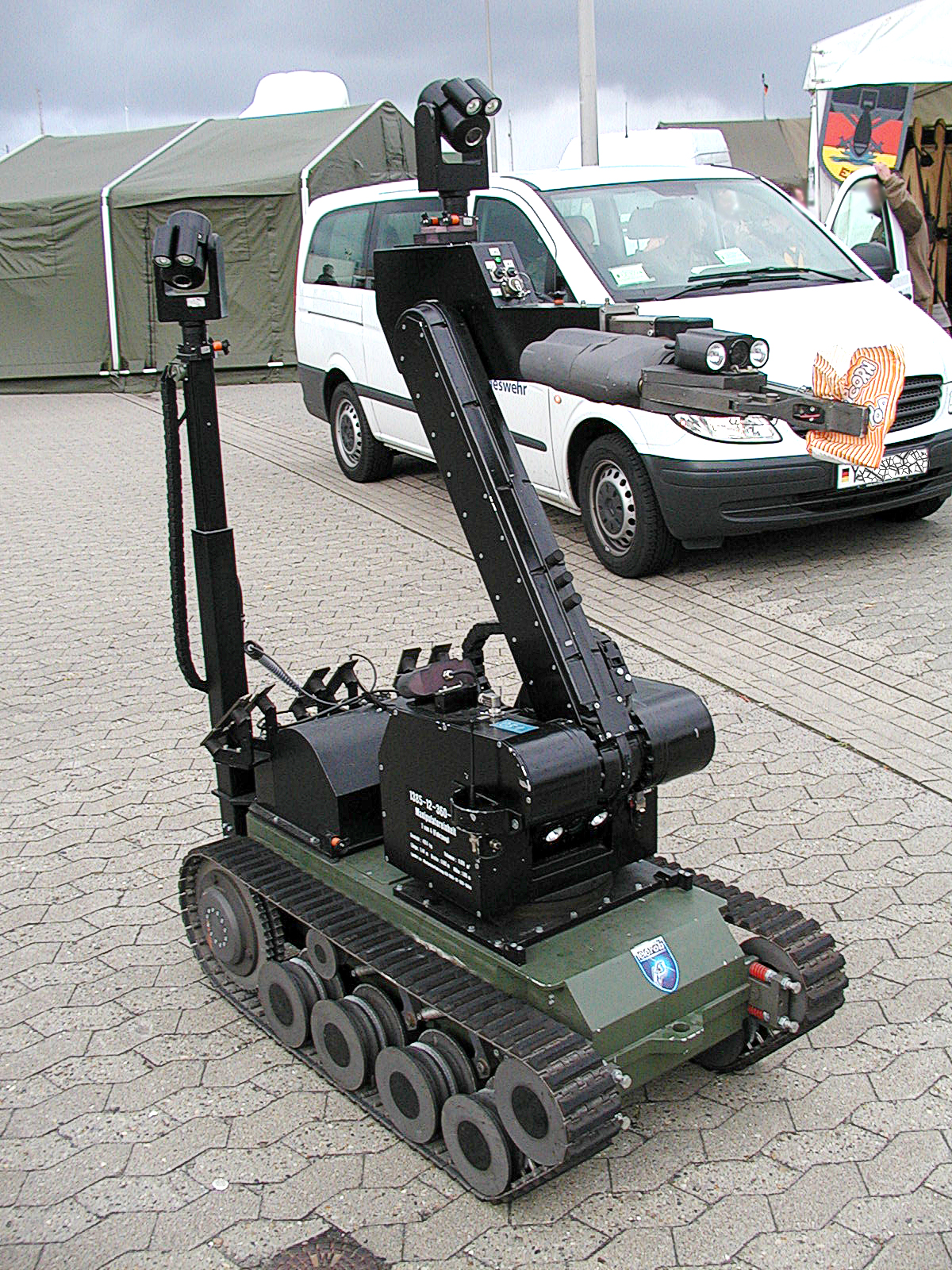 Ein "Manipulator" der Kampfmittelbeseitiger bei der Bundeswehr, mit drei Kameras ausgestattet.